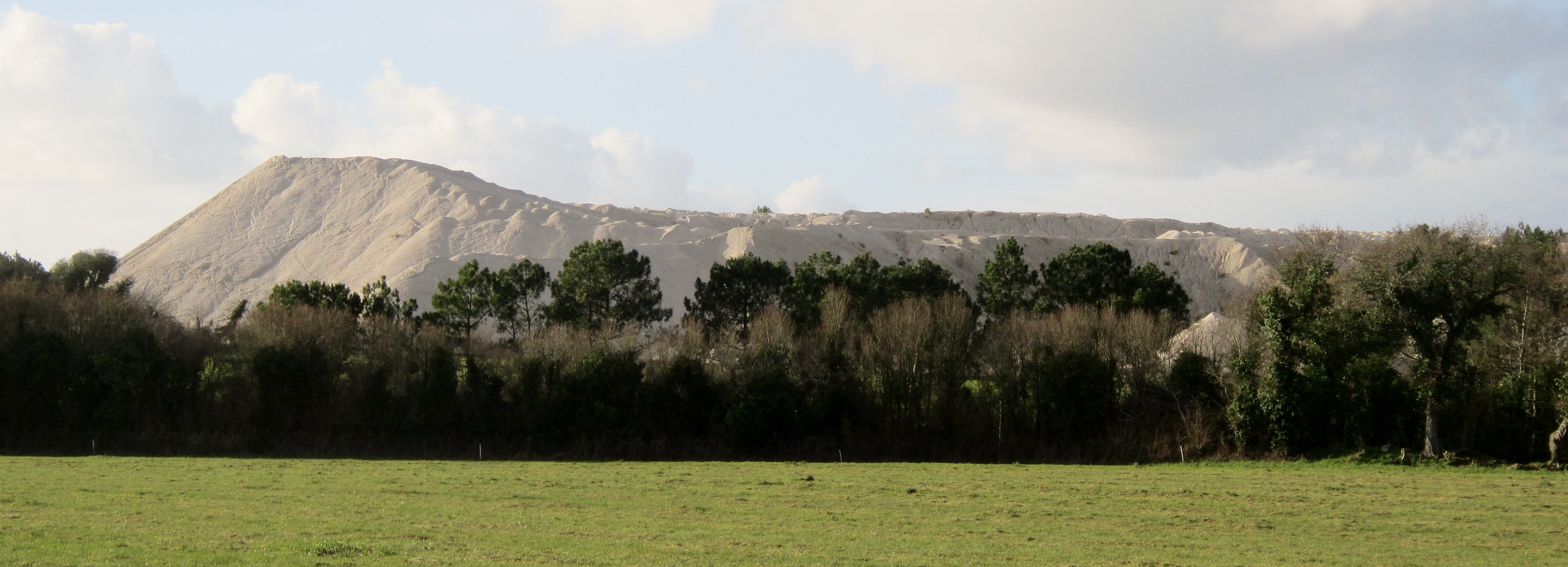 Ploemeur : le terril lié à l'exploitation du kaolin.